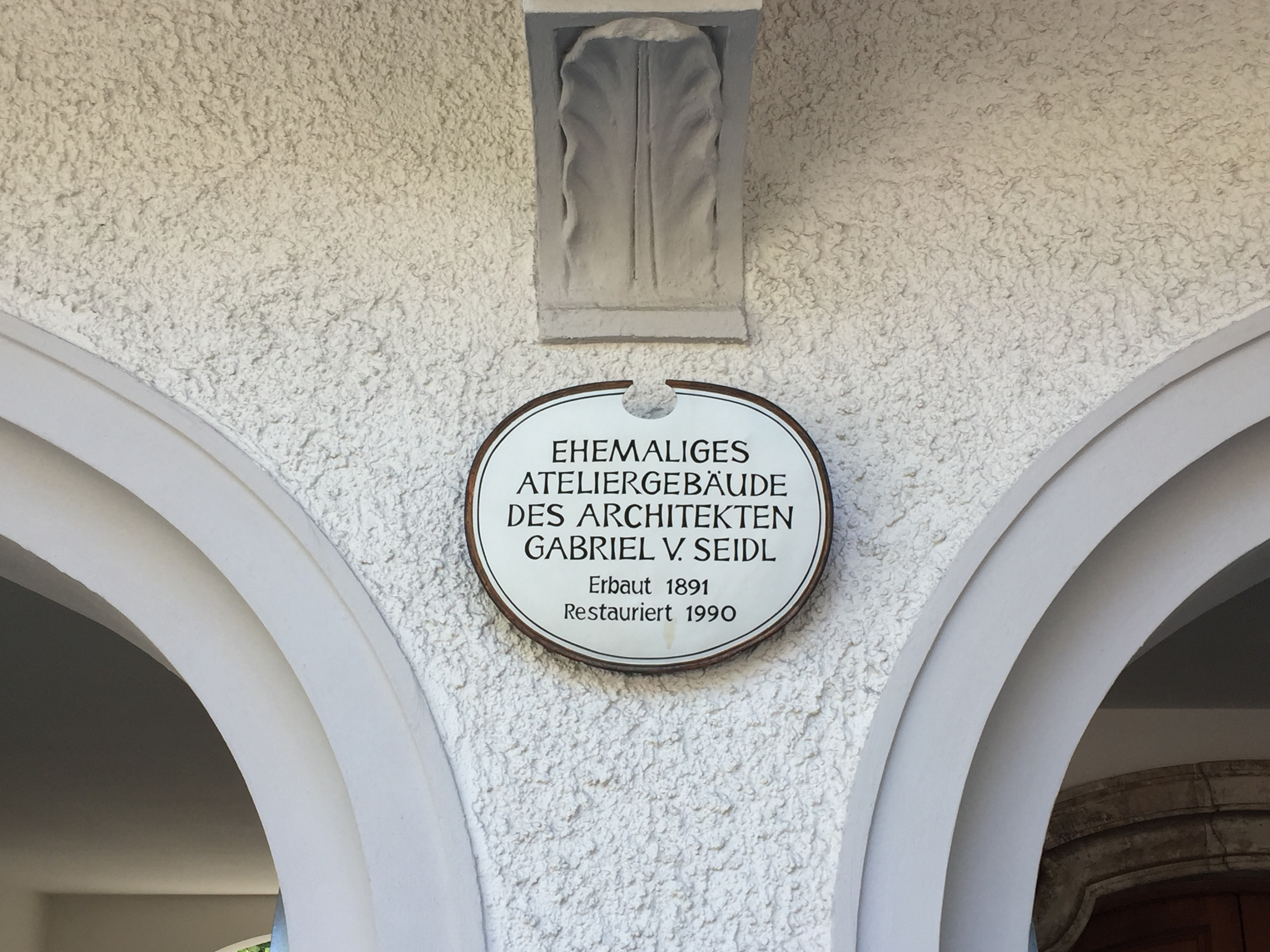 Schild: Atelier Gabriel von Seidl, Seidlstraße 18, München